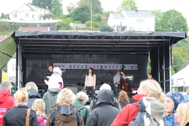 Bilde fra Parkkonsert i Barbu, 2009